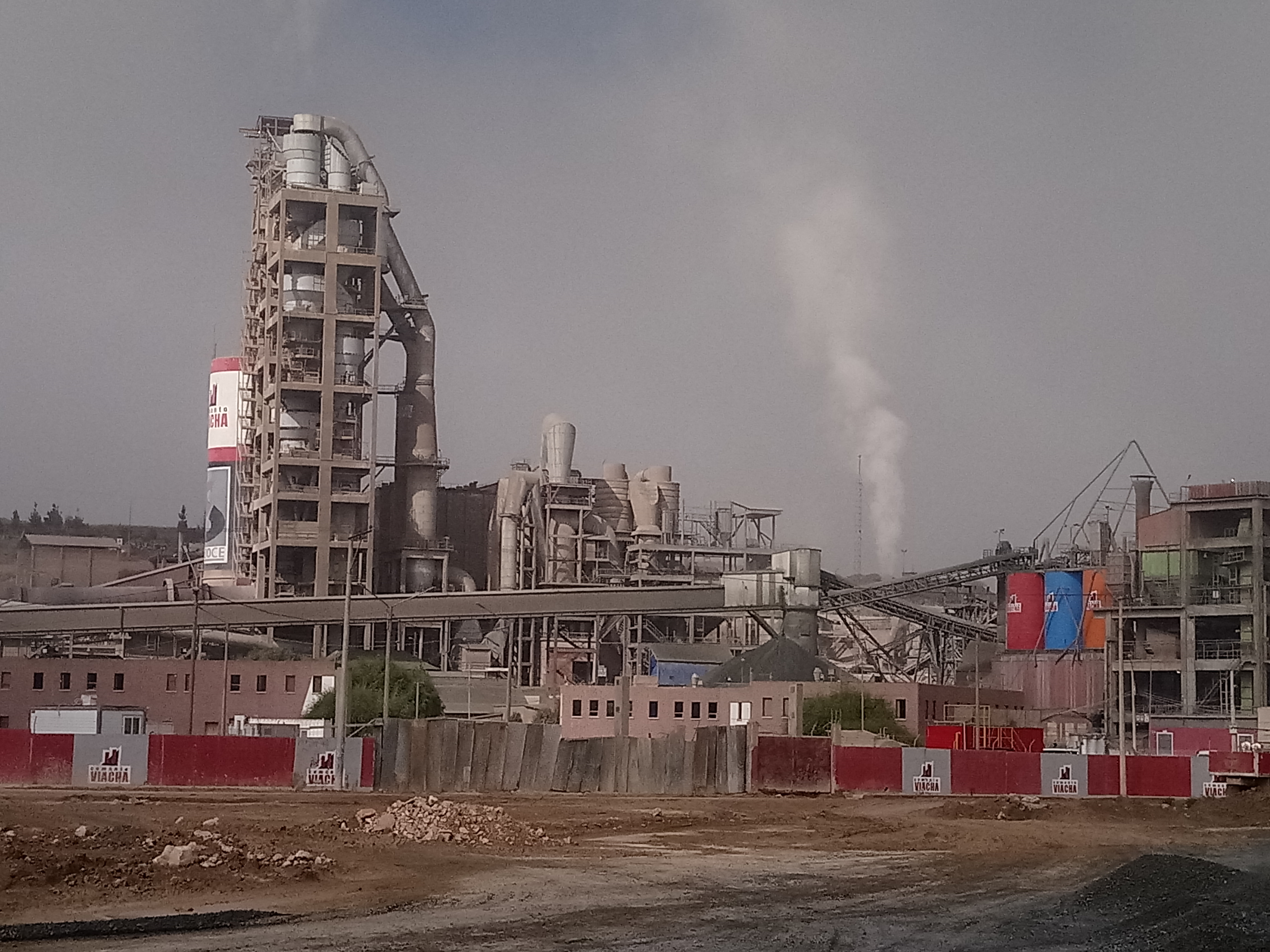 Vista lateral de la fábrica de cemento Viacha